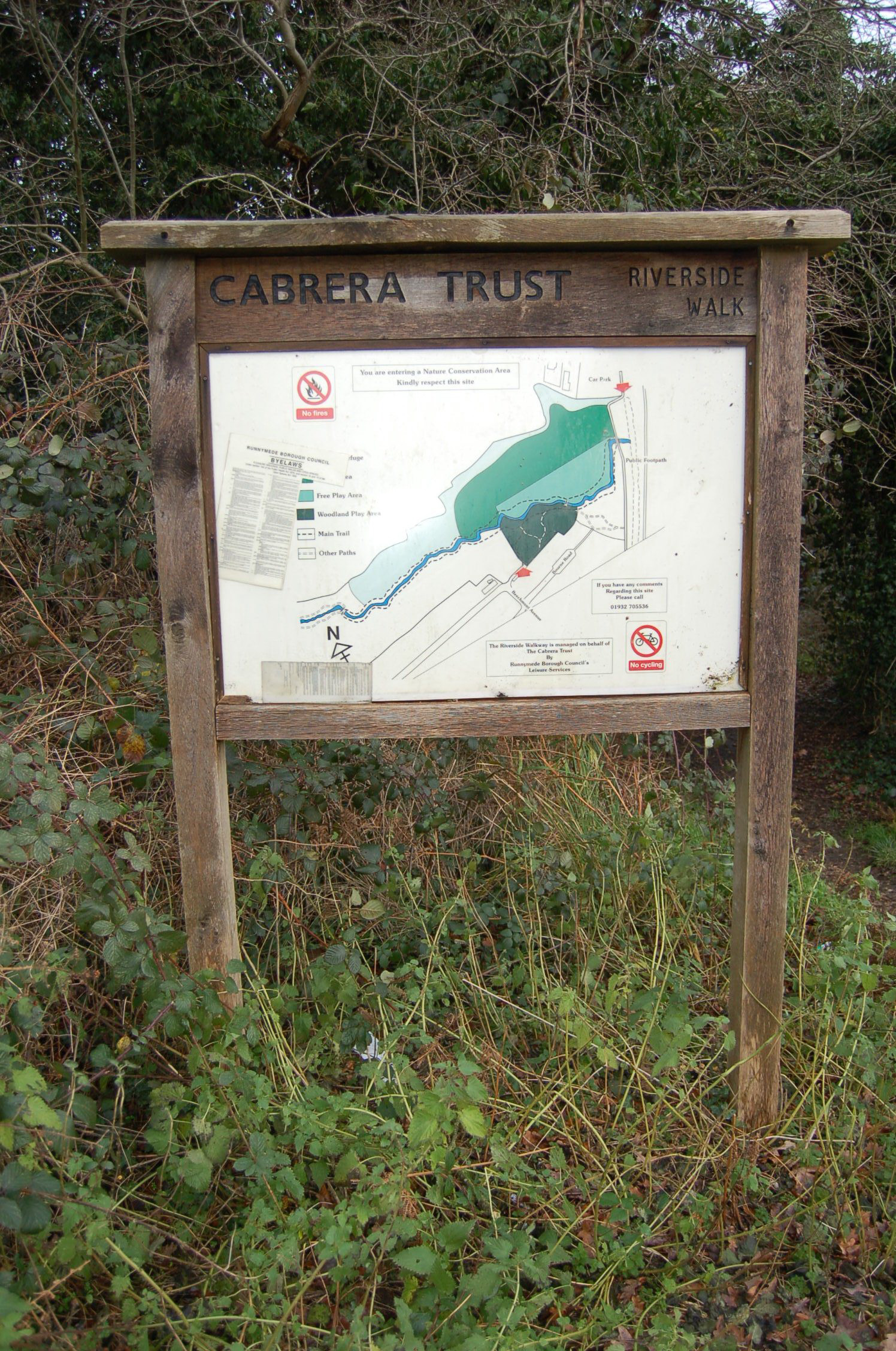 Cabrera Trust